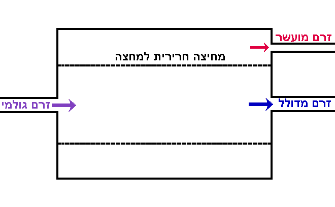 תאור סכמטי של דיפיוזר להעשרת אורניום